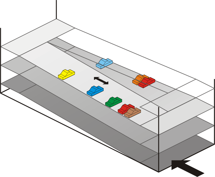 Schematische Darstellung eines Parkhauses.